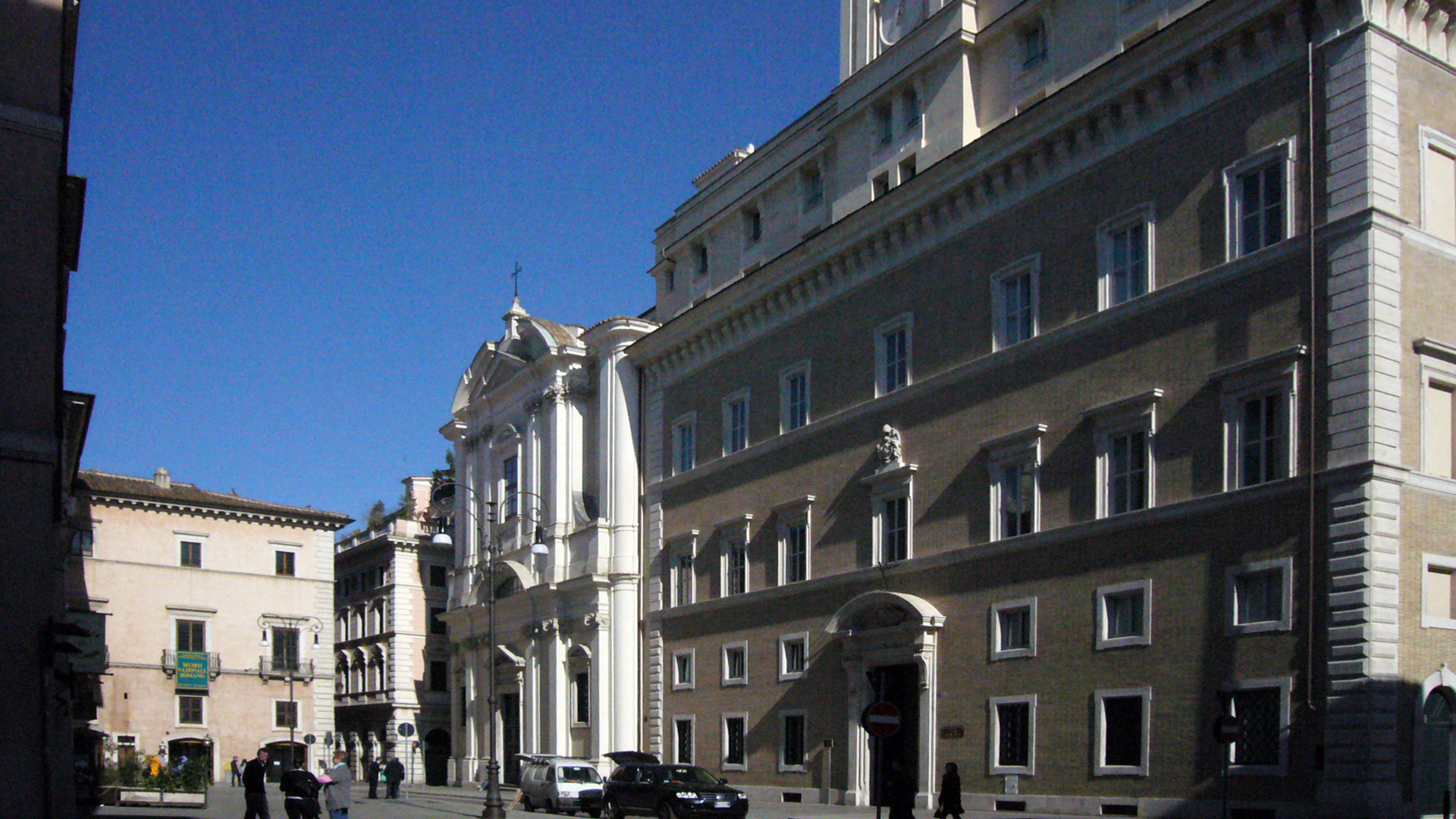 Roma, piazza sant'Apollinare - da sinistra: palazzo Altaemps, chiesa di sant'Apollinare, palazzo dell'ex Collegio germanico, oggi sede della Pontificia Università della Santa Croce (Opus Dei)